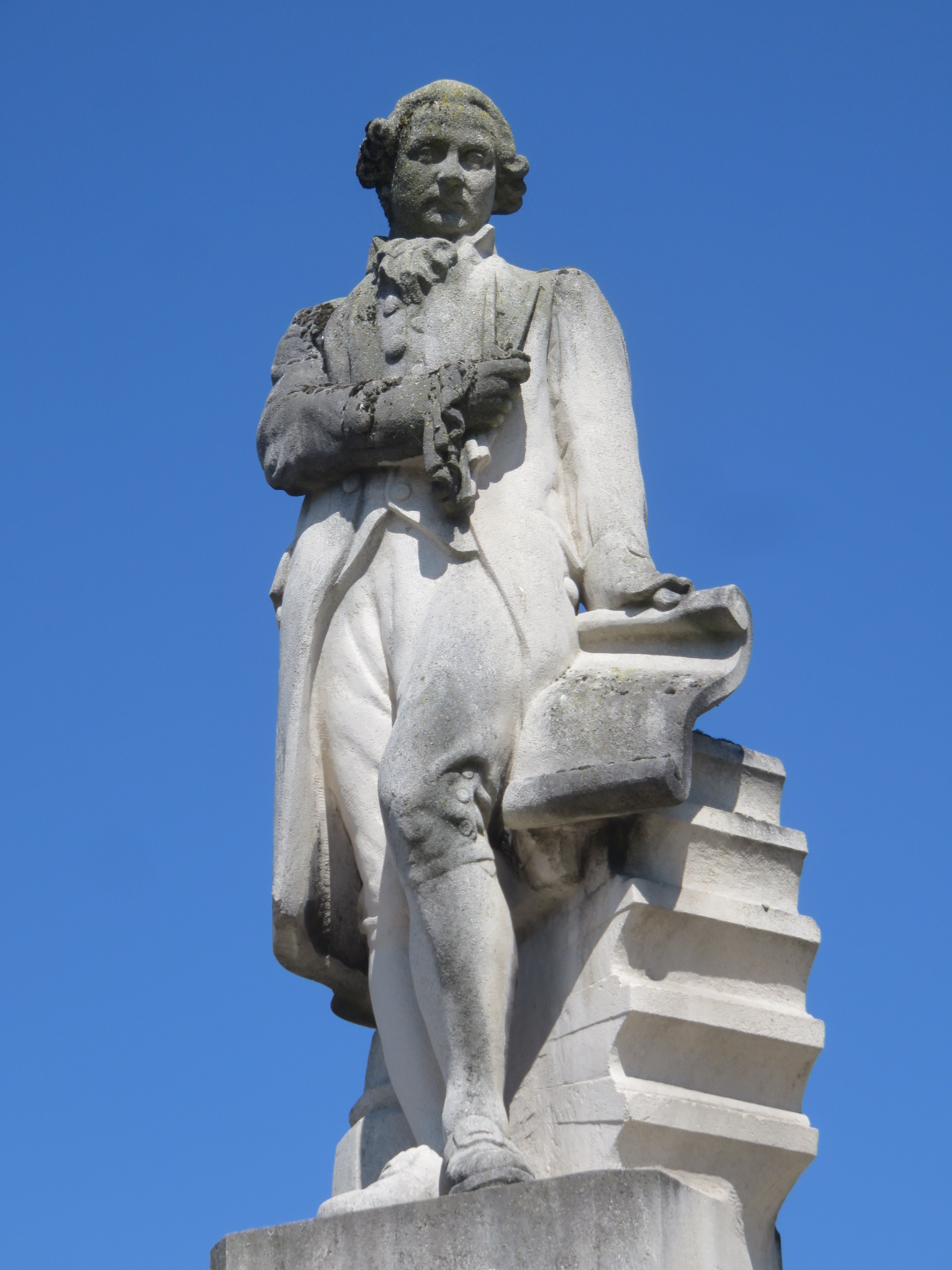 Claude François Jouffroy d'Abbans, Promenade de l'Helvétie au bord du Doubs, à Besançon